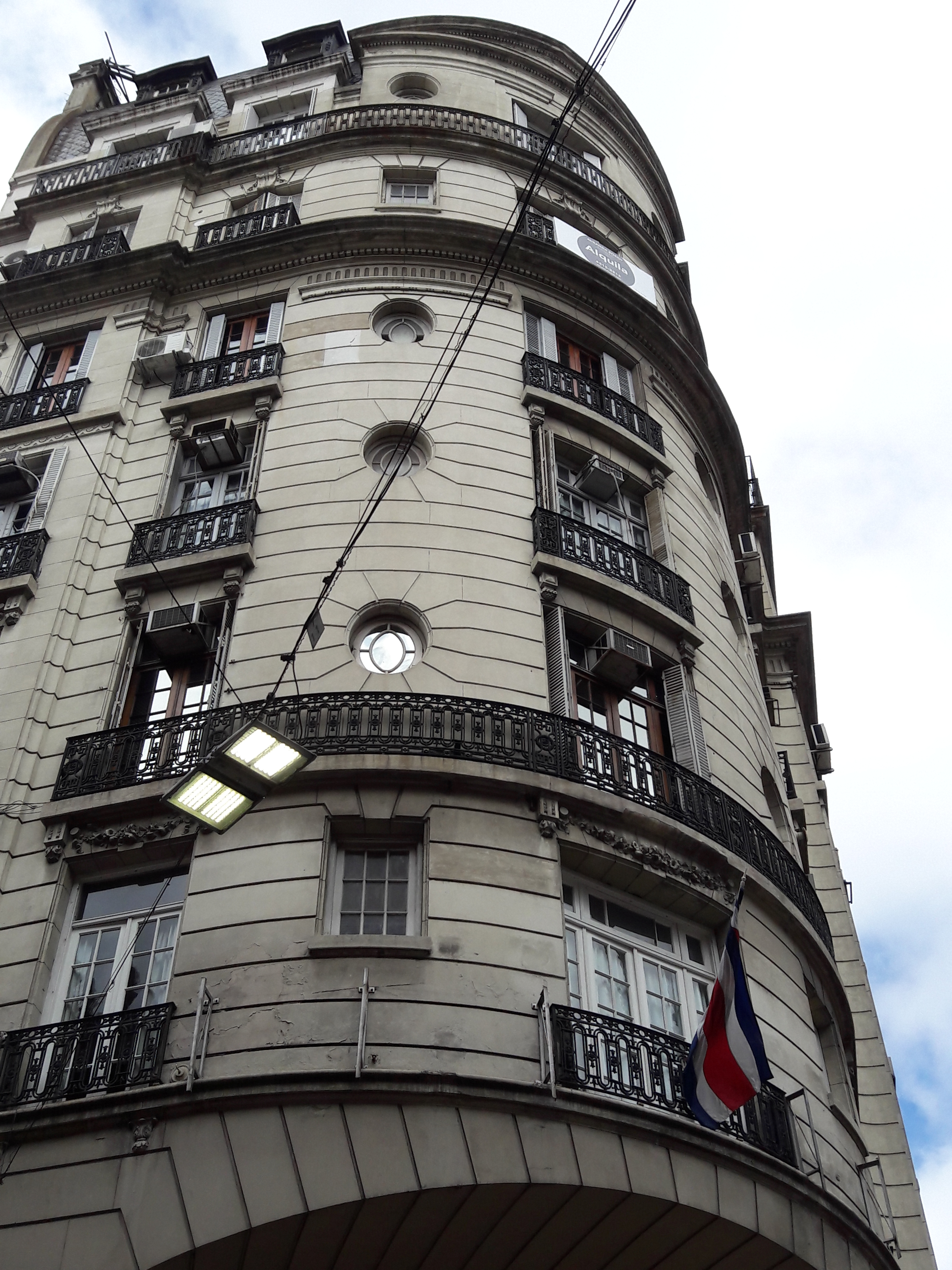 Embajada de Costa Rica, San Nicolás, Buenos Aires, Argentina.